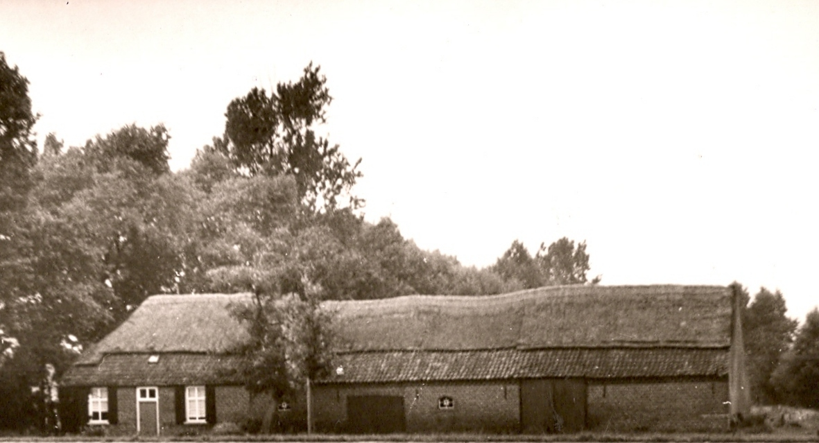 De Plashoeve te Lieshout in 1970. Tijdens een storm in 1915 is de oostgevel omgewaaid. De muur is zonder wolfseind, dus tot de nok rechtop weer opgebouwd. De boerderij werd daardoor vijf meter korter